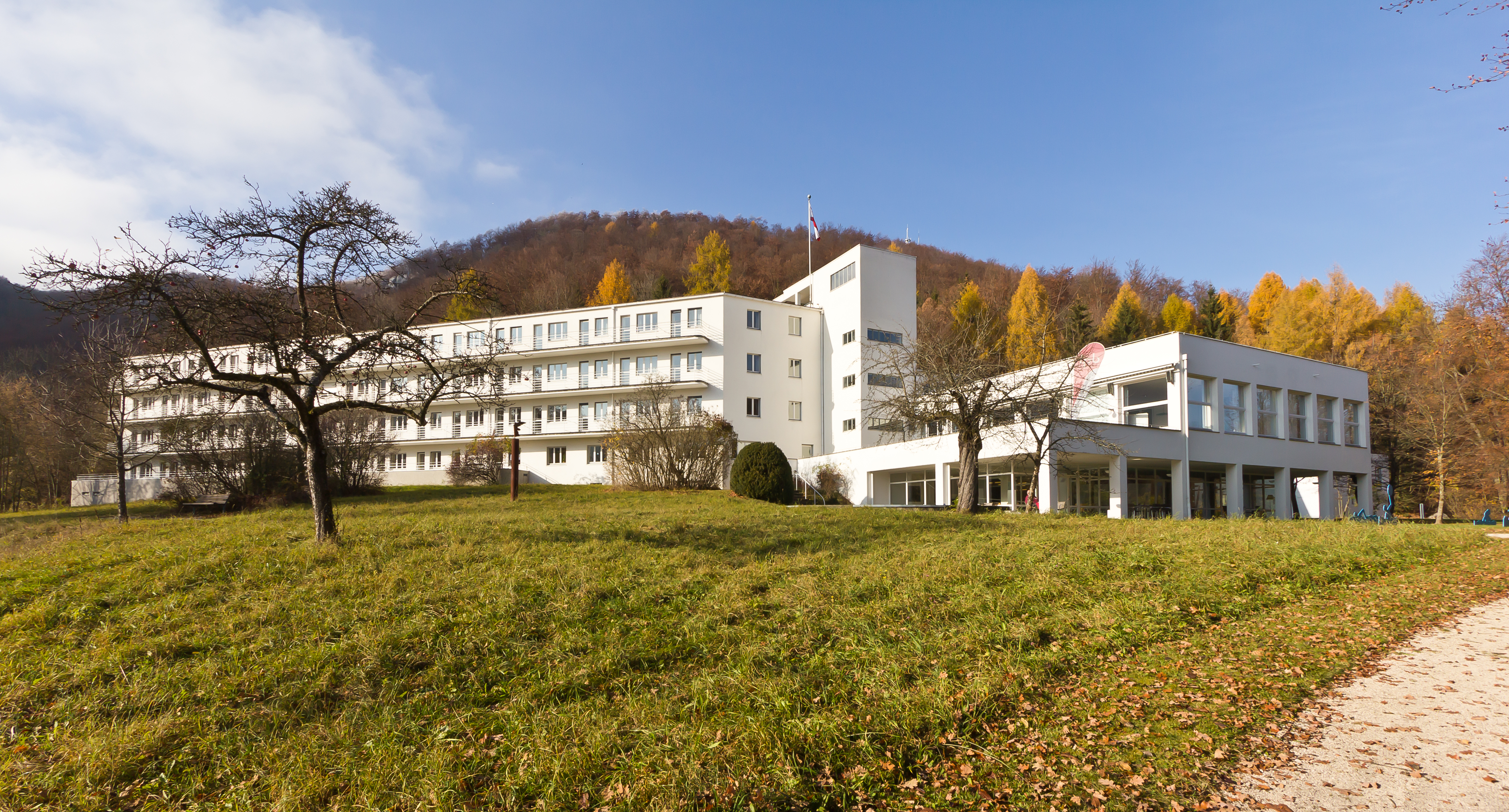 Das Haus auf der Alb, denkmalgeschützt, Rückseite, Bad Urach im Herbst 2011